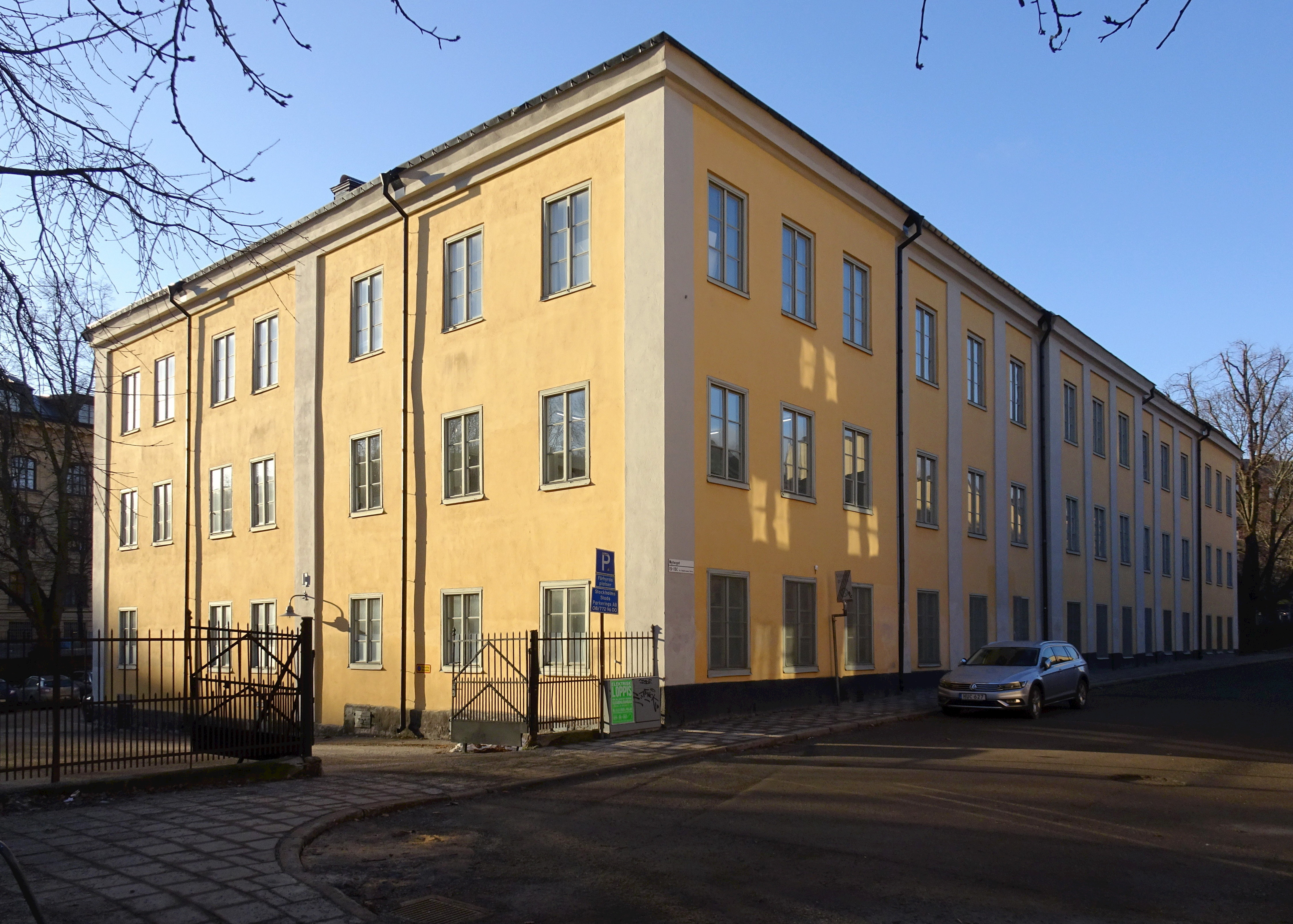 Malongen, Nytorget 15C, Södermalm